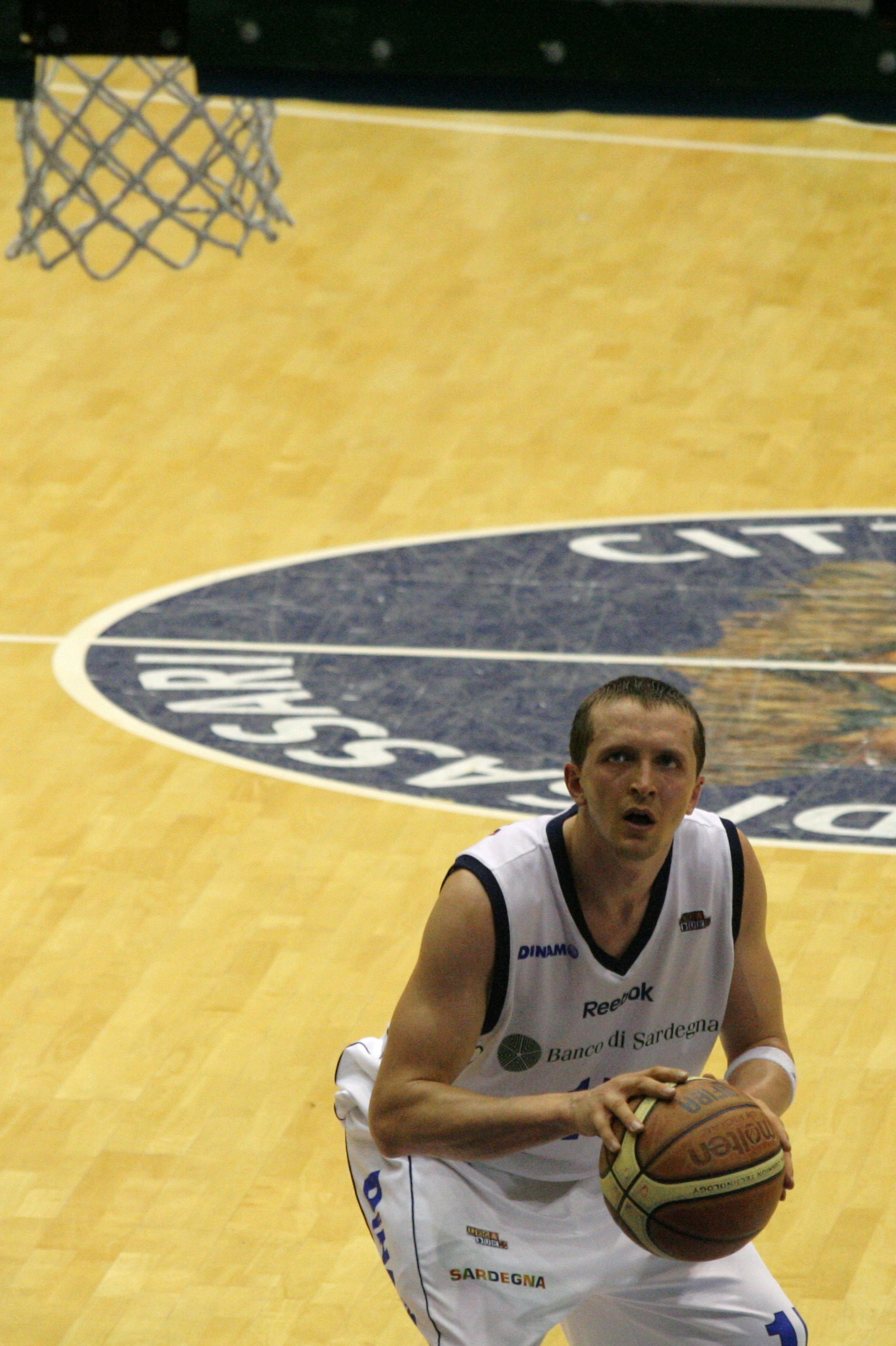 Autore: Francesco Canu Utente:Cesco77, Foto: Trent Whiting con la maglia della Dinamo Sassari